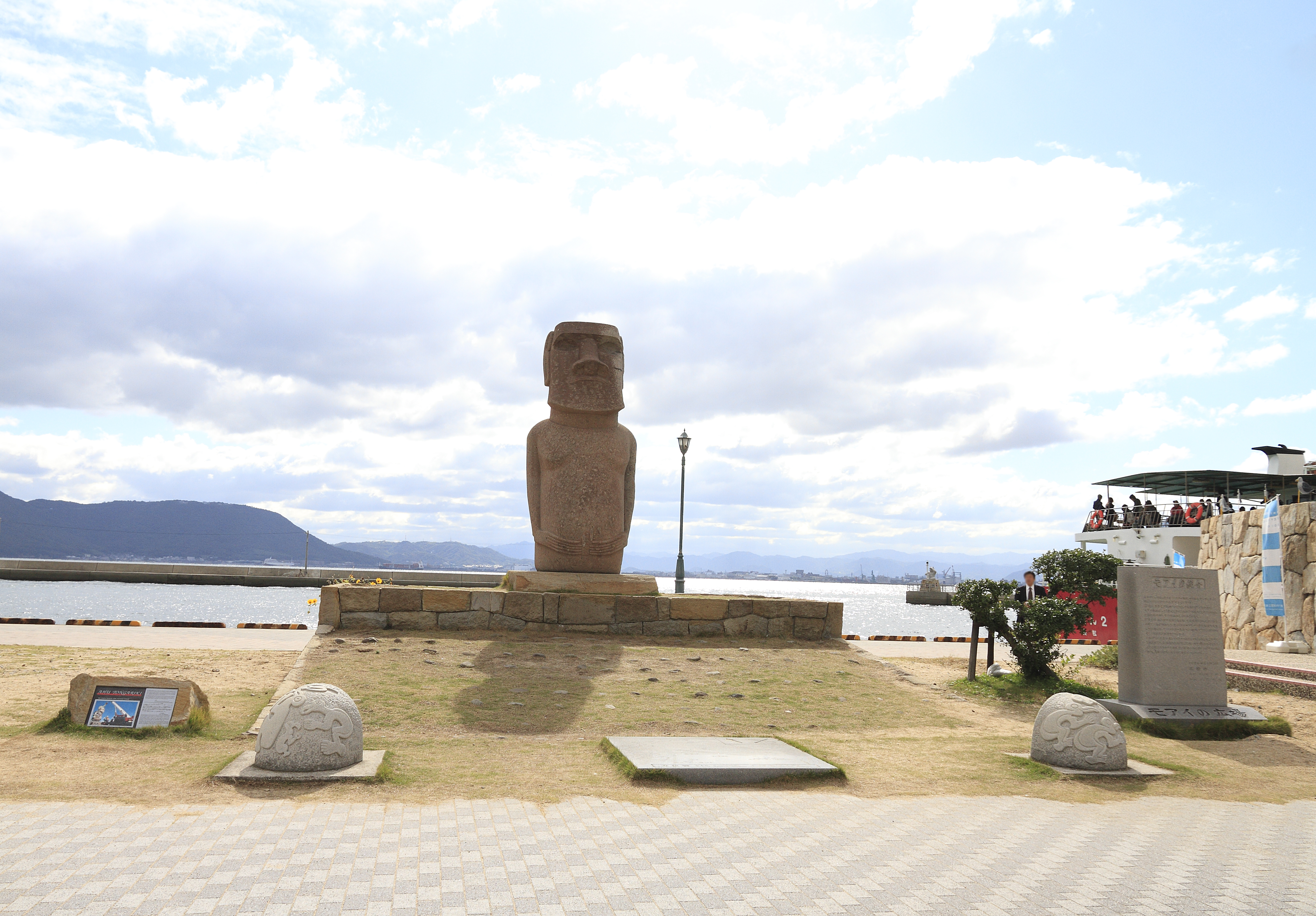 モアイ像 香川県高松市女木町 女木港 モアイの広場